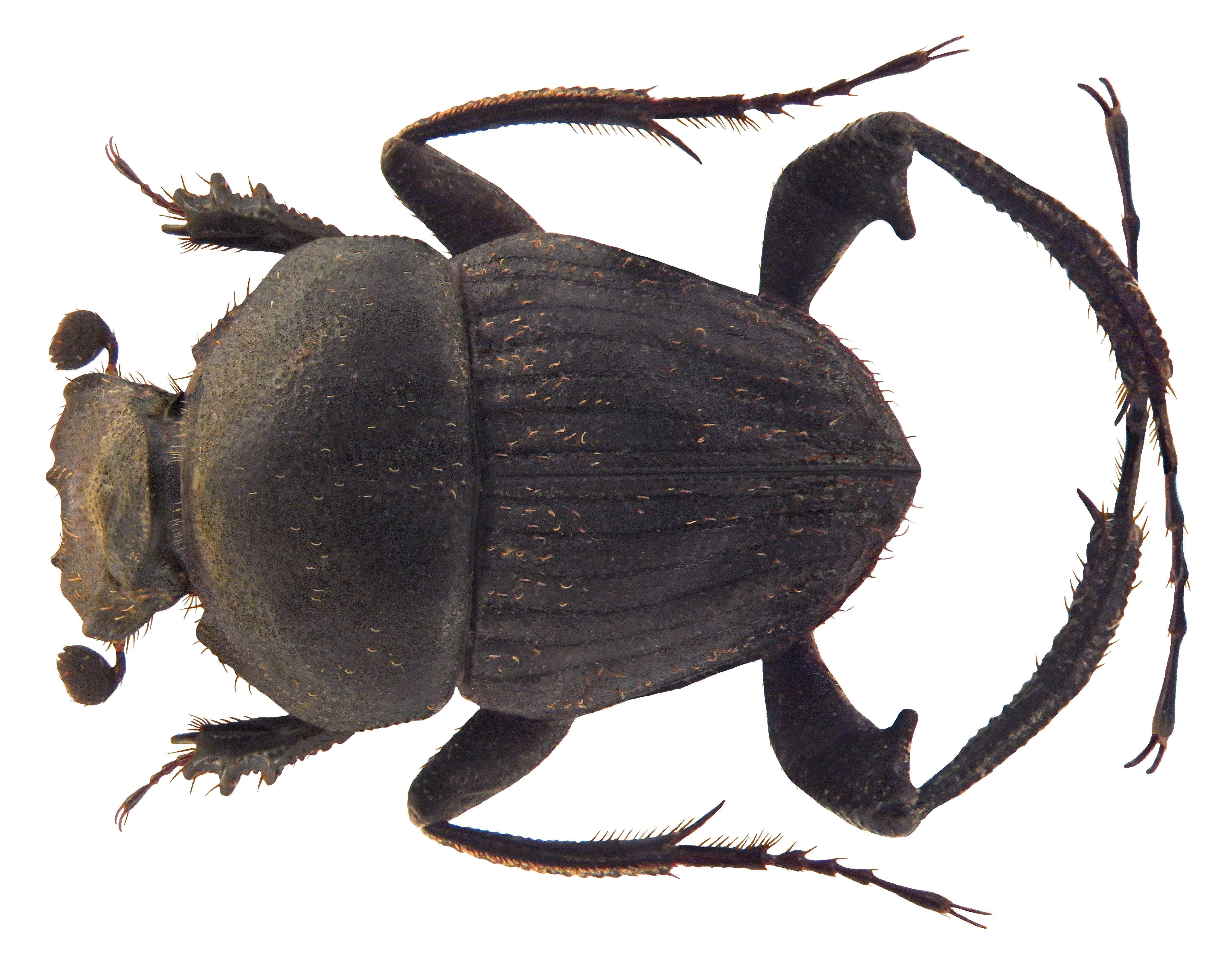 Familie: Scarabaeidae Groesse: 11,0 mm Fundort: Nepal, Chitwan-District, Chitwan, Sauraha leg. W.Schawaller, 1997; det. J.Scheuern, 1999 Photo: U.Schmidt, 2010